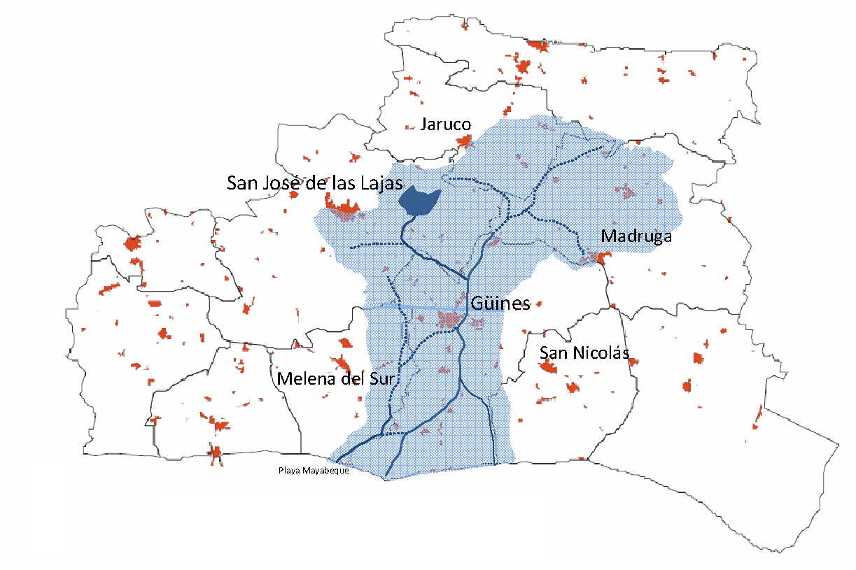 Cuenca dl río Mayabeque en Cuba